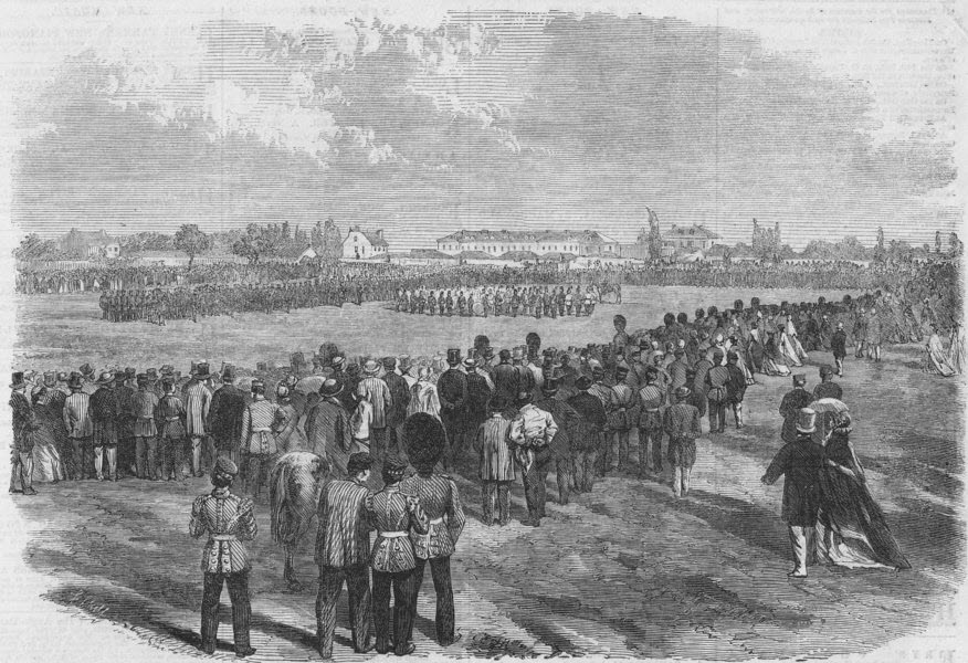 Présentation des couleurs du Victoria Rifles of Canada à Montréal en 1862. Image parue dans The Illustrated London News le 19 octobre 1862.